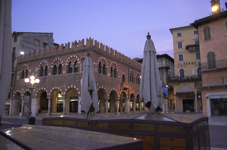 La Domus Mercatorum in piazza Erbe a Verona